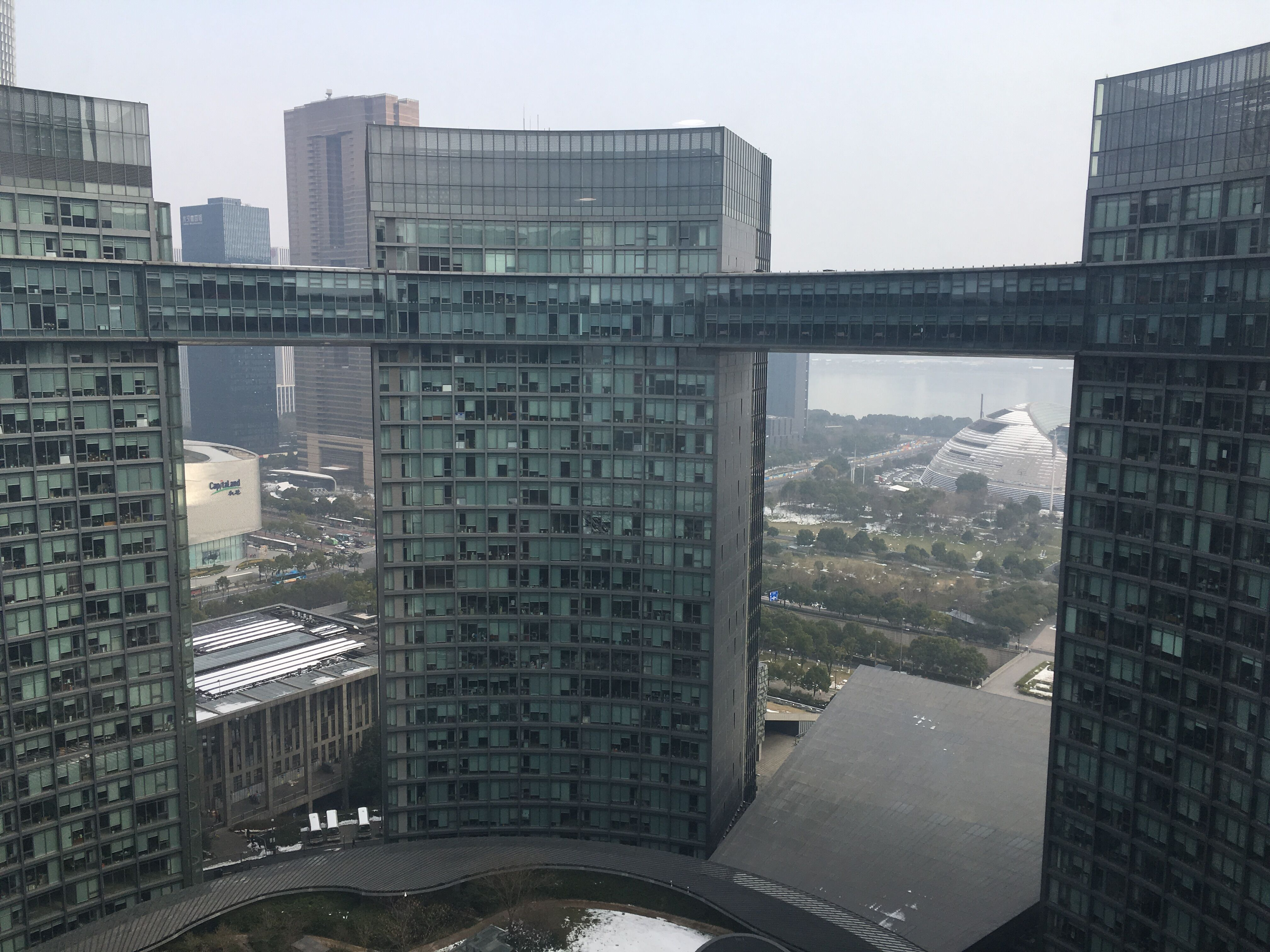 杭州市民中心大楼空中走廊